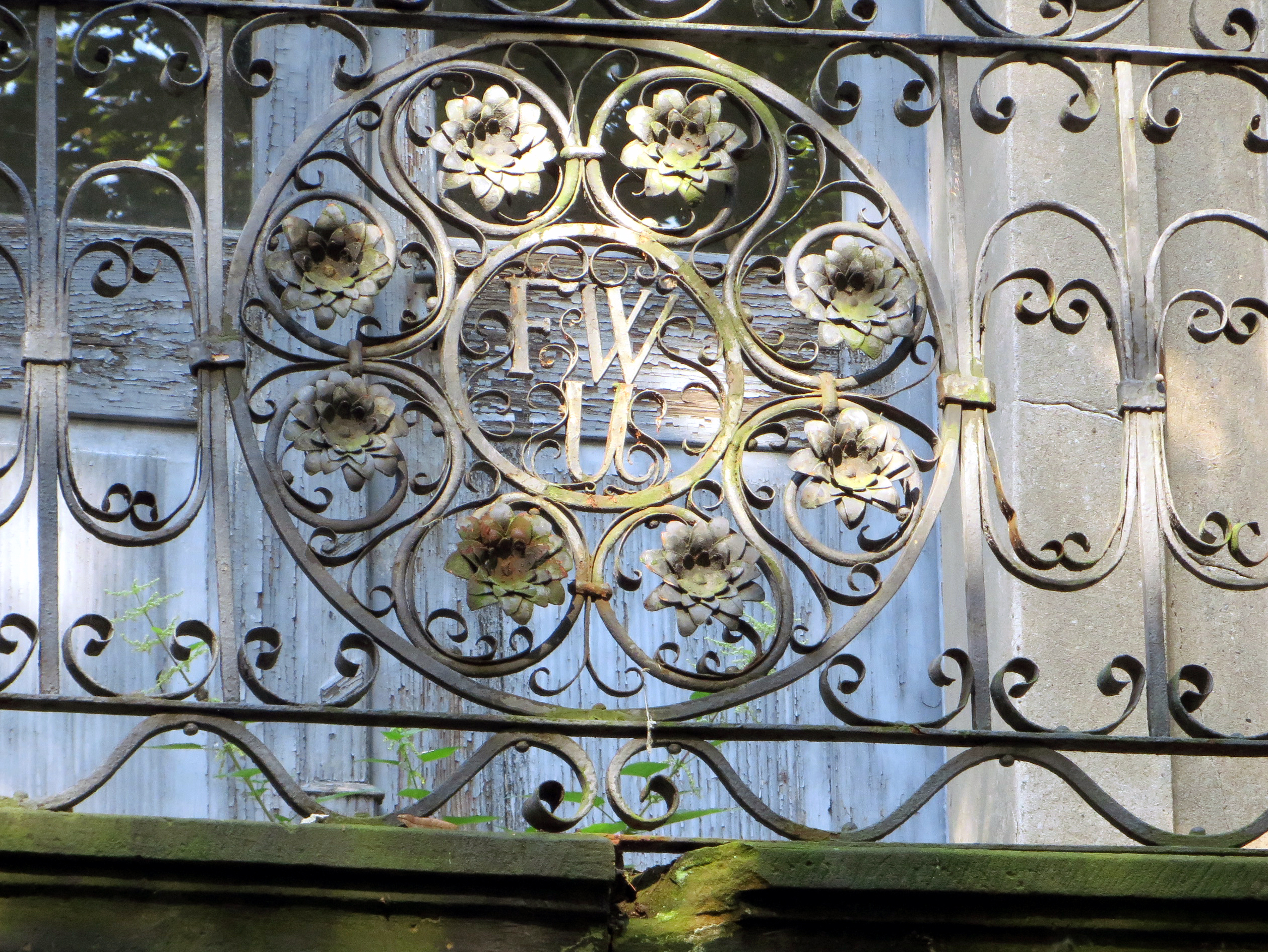 Gloriet v Poděbradech.